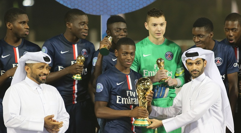 باريس سان جيرمان يتوج بطلا للنسخة الرابعة من بطولة الكأس الدولية